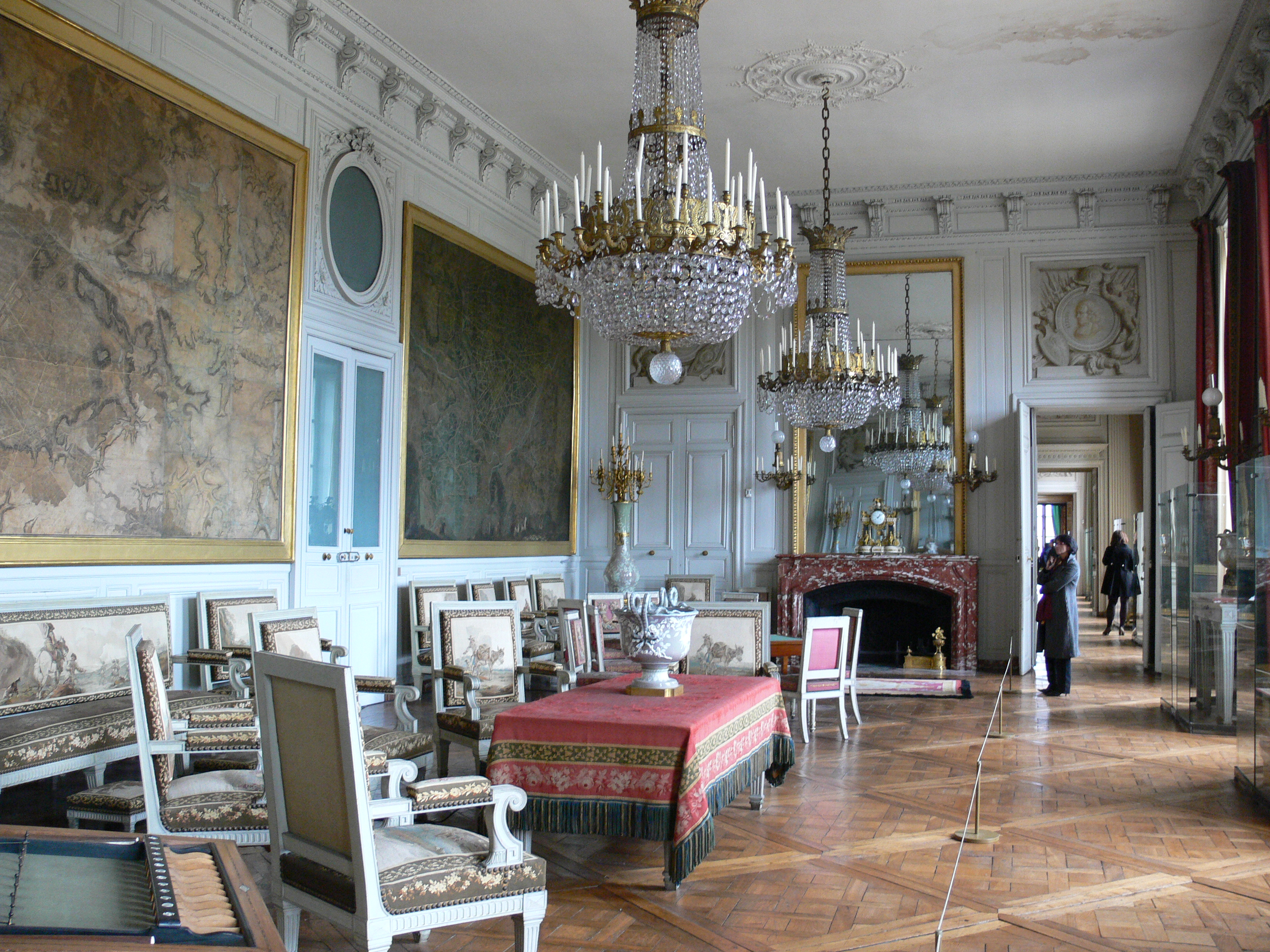 Compiègne, France: Château de Compiègne Les appartements historiques